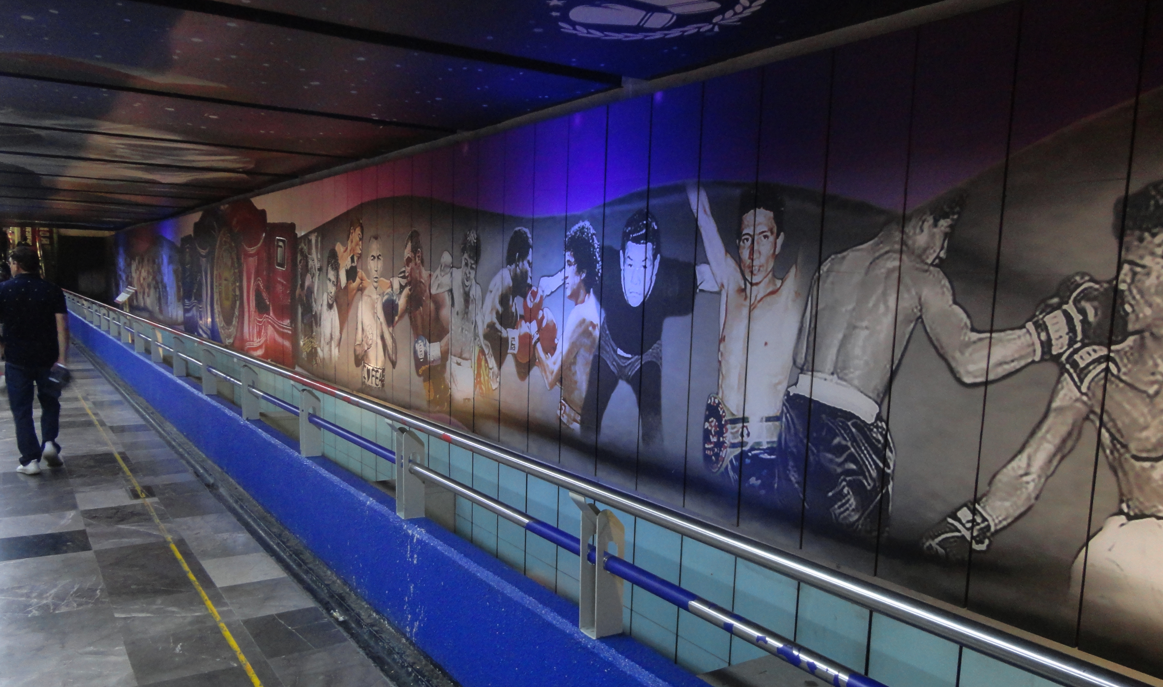 Ídolos del Boxeo Mexicano - Estación Garibaldi-Lagunilla - Metro de la Ciudad de México